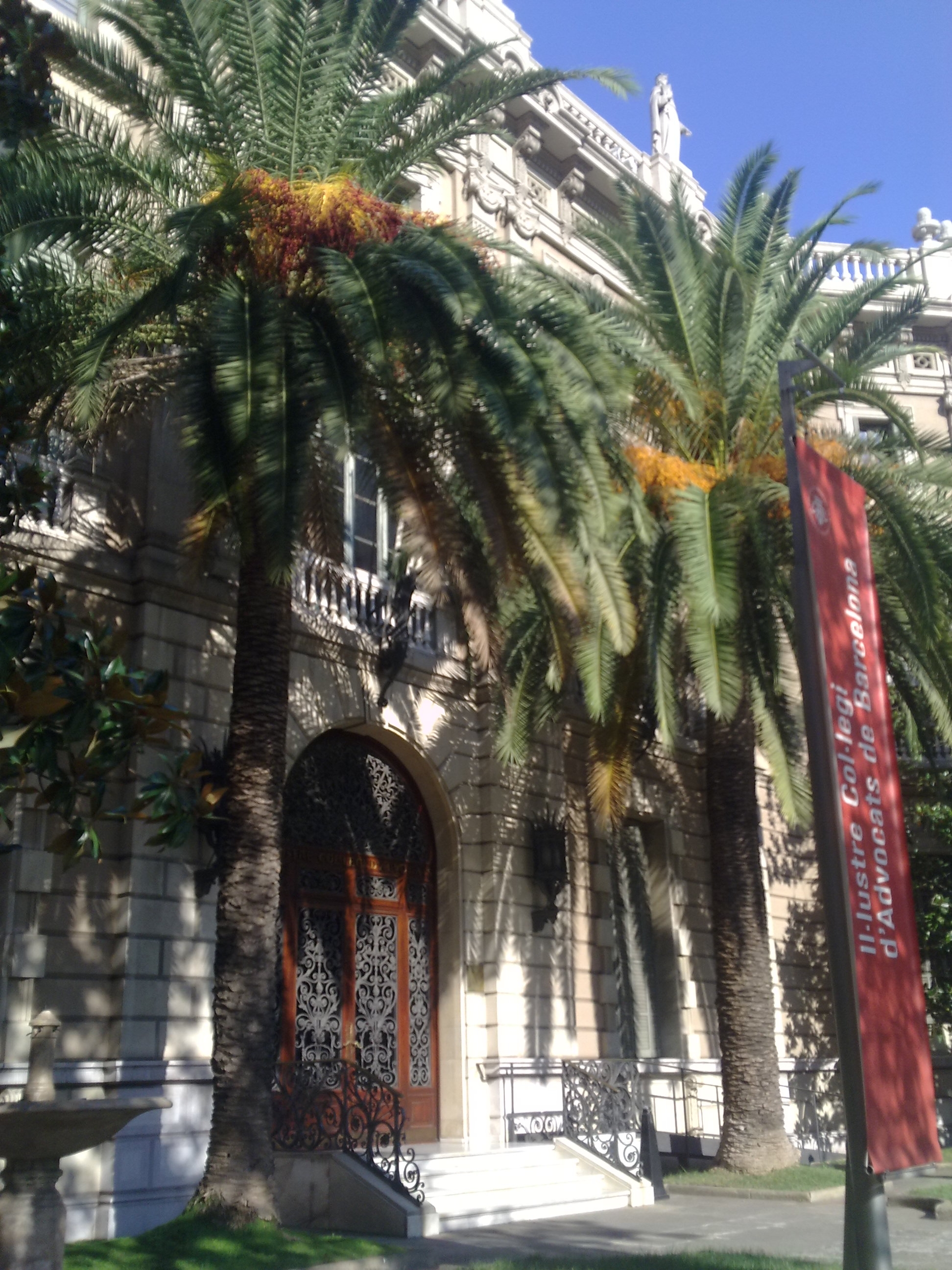 Palau Casades (Barcelona)